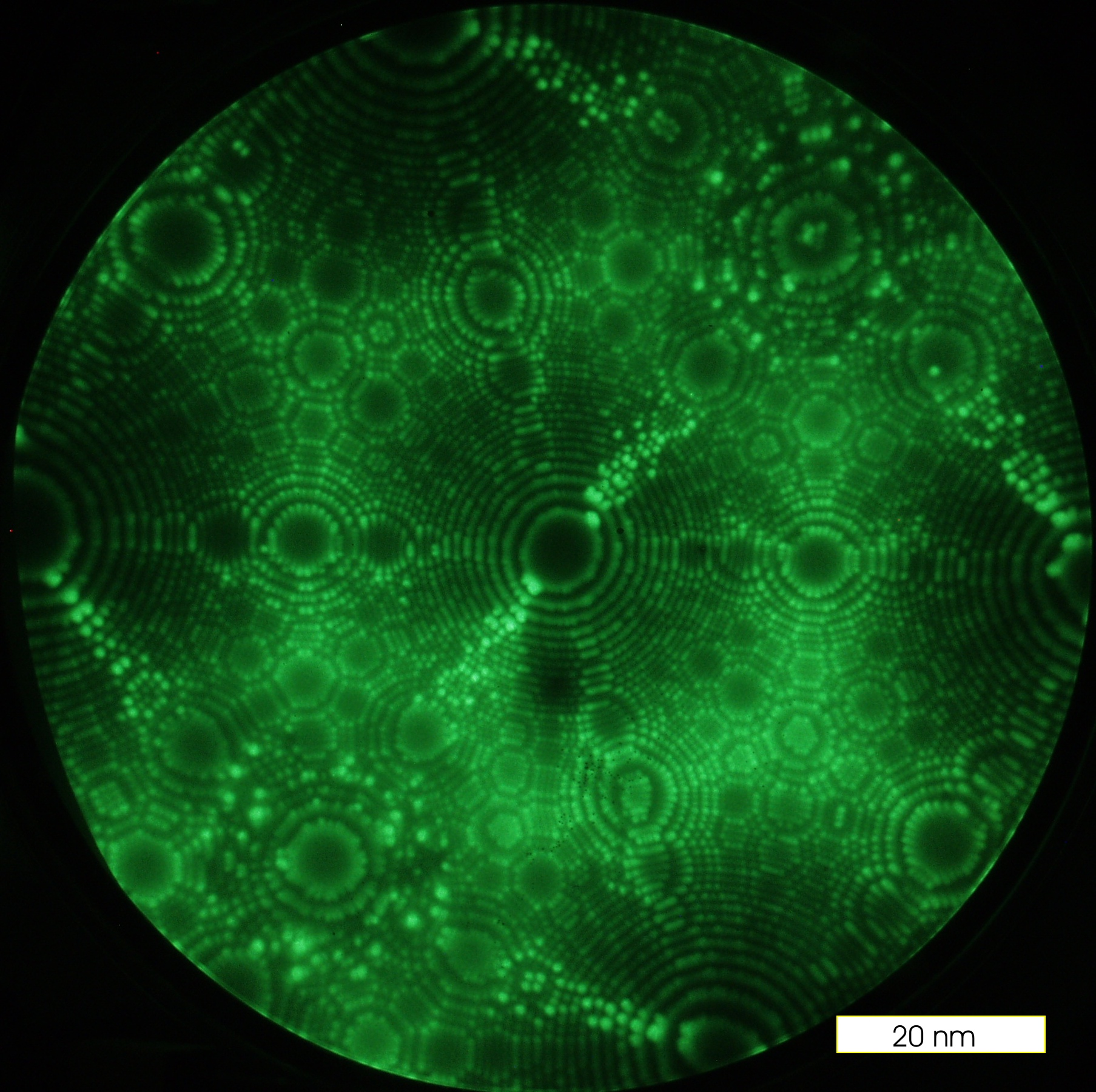 Feldionemikroskopbild einer Wolframspitze mit einem -Pol in der Mitte